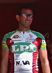 Elia Aggiano. Team L.P.R.